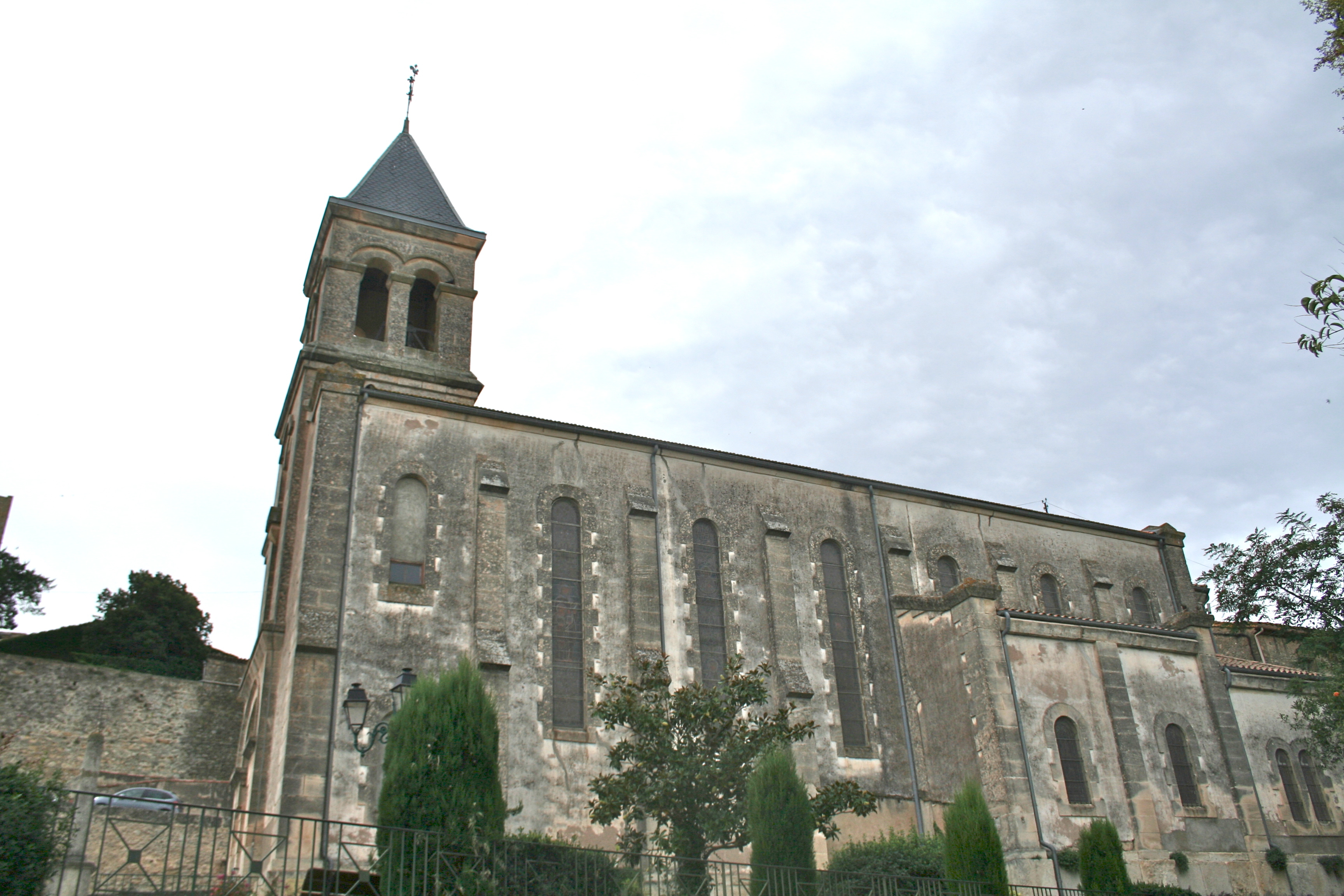 Montady (Hérault) - église Saint-Geniès.